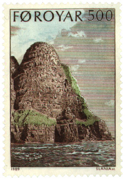 Das Kliff Beinisvørð an der Westküste Suðuroys nahe Sumba (Färöer) Briefmarke: Postverk Føroya Grafik: Czeslaw Slania